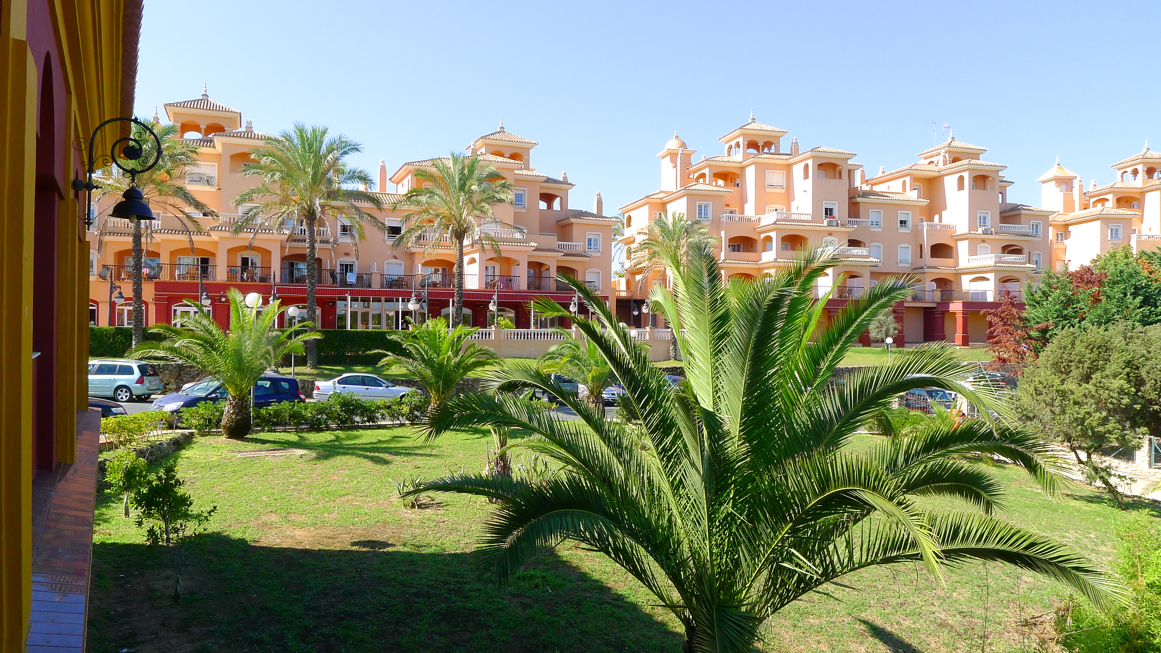 Apartamentos turísticos de las instalaciones deportivas.